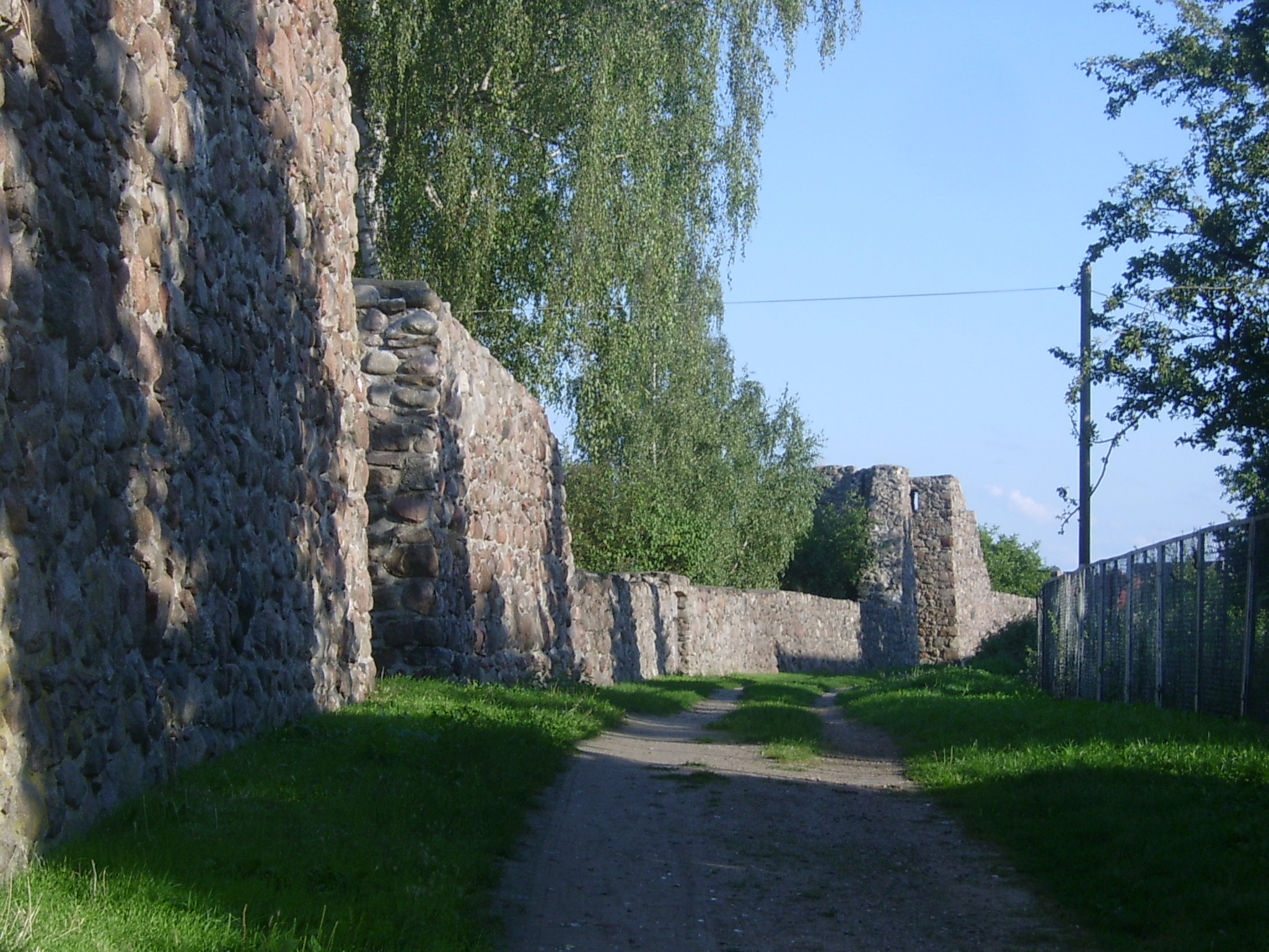 Strzelce Krajeńskie - mury obronne wraz z 36 basztami, XIII